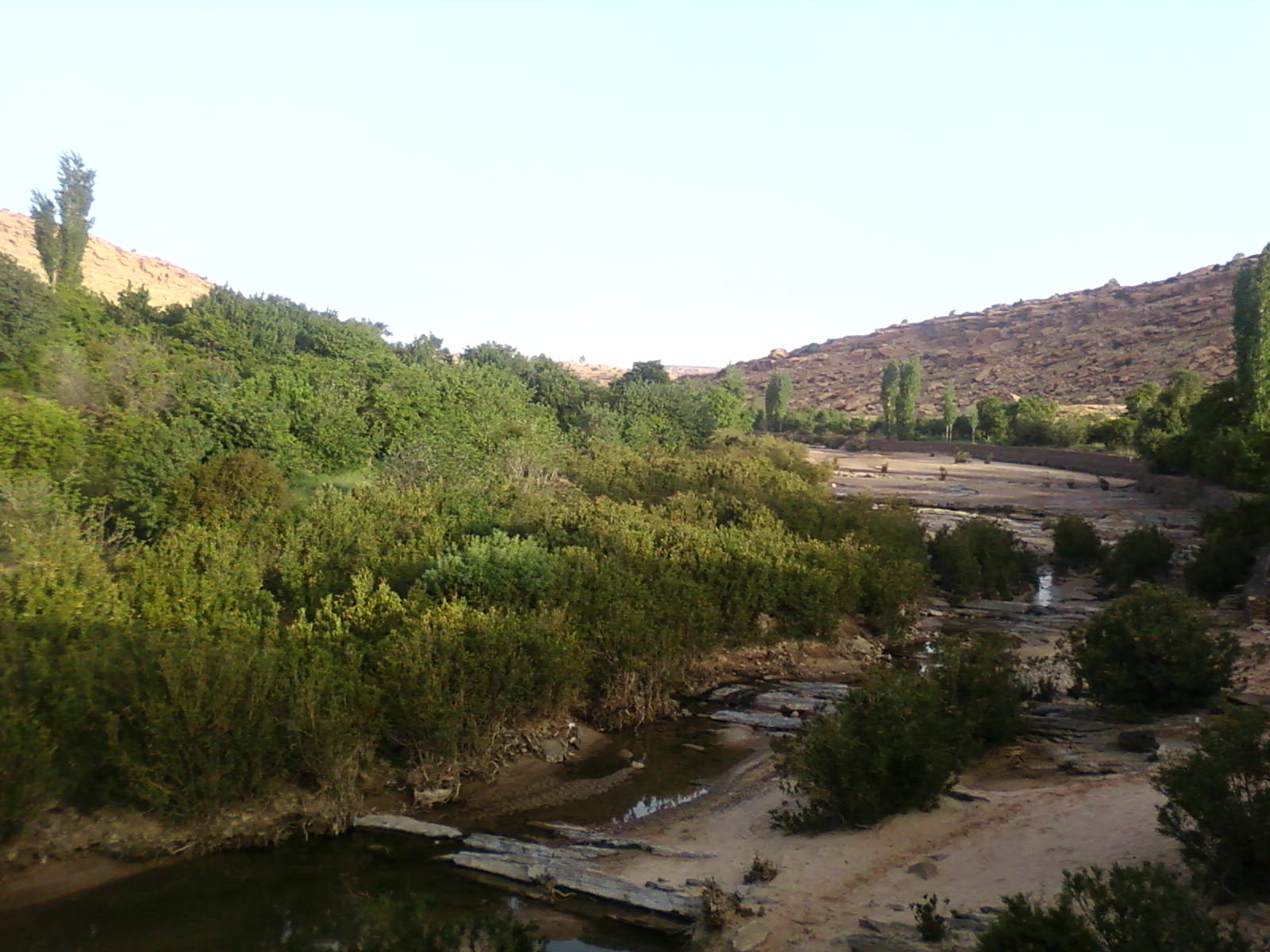 Oued El Ghicha Laghouat (Algérie)